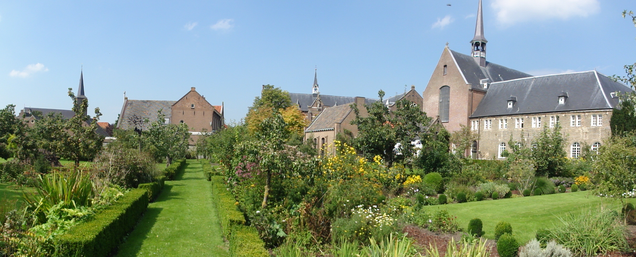 Megen panorama: parochiekerk, latijnse school, klooster met kloosterkerk, hof van lof (thematische kloostertuin). 34″ N, 5° 33′ 49.46″ E 59″ N, 5° 33′ 56.93″ E 29″ N, 5° 33′ 59.22″ E Object location51° 49′ 22.43″ N, 5° 33′ 59.07″ E